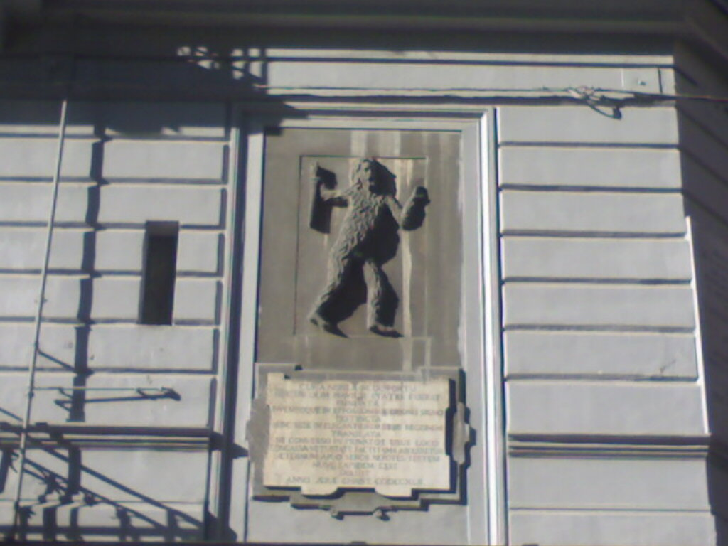 Simboli nelle strade di Napoli